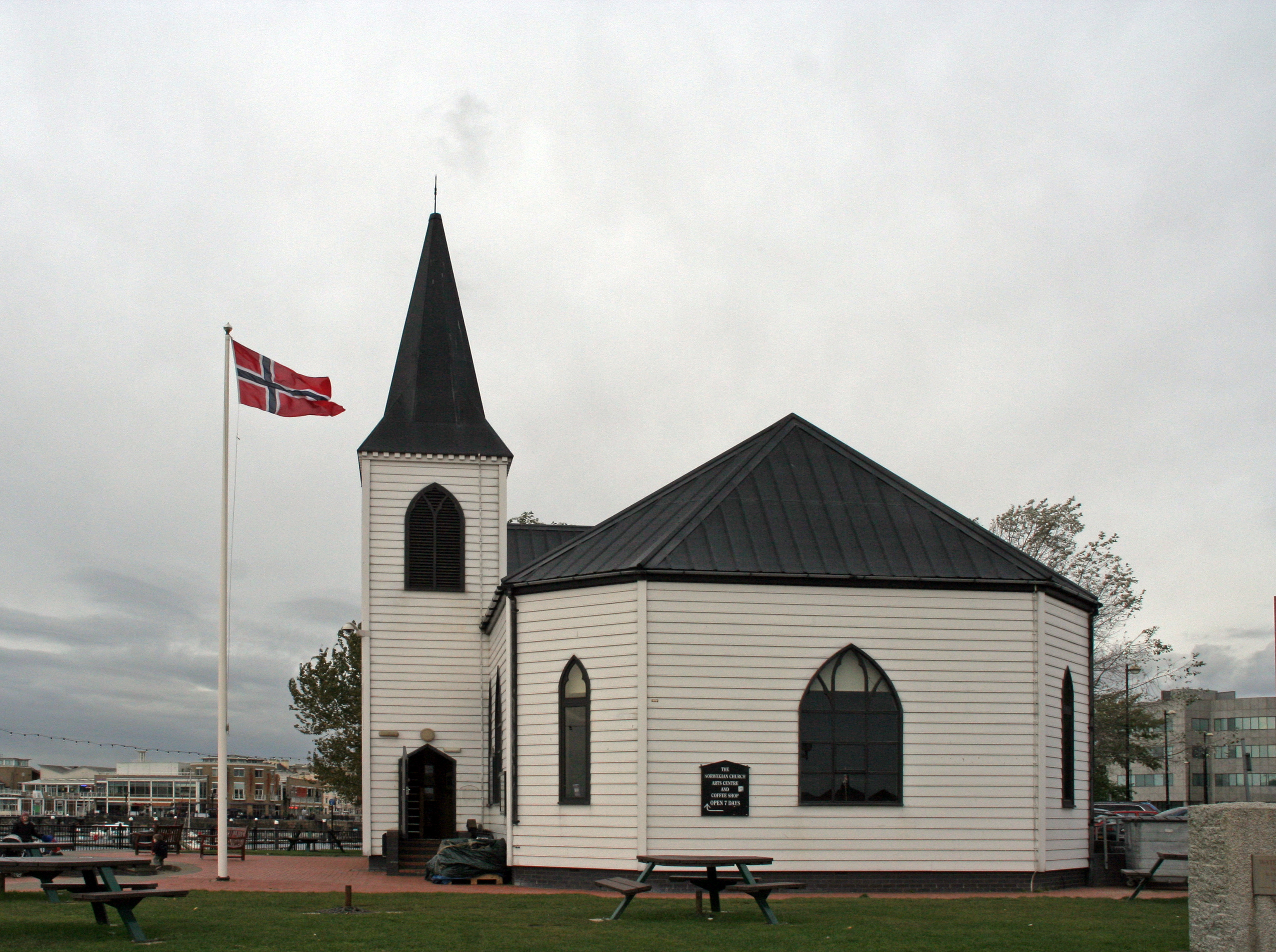 Norwegian Church Cardiff Bay